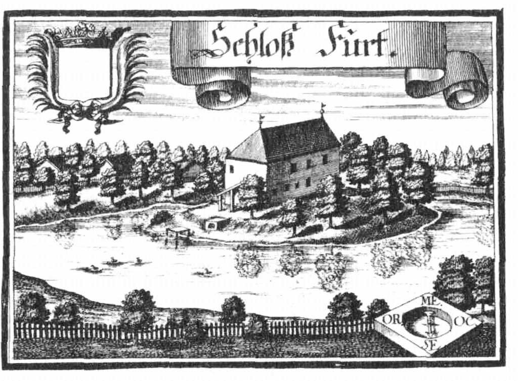 Schloss Furth nach einer Radierung von Michael Wening von 1721